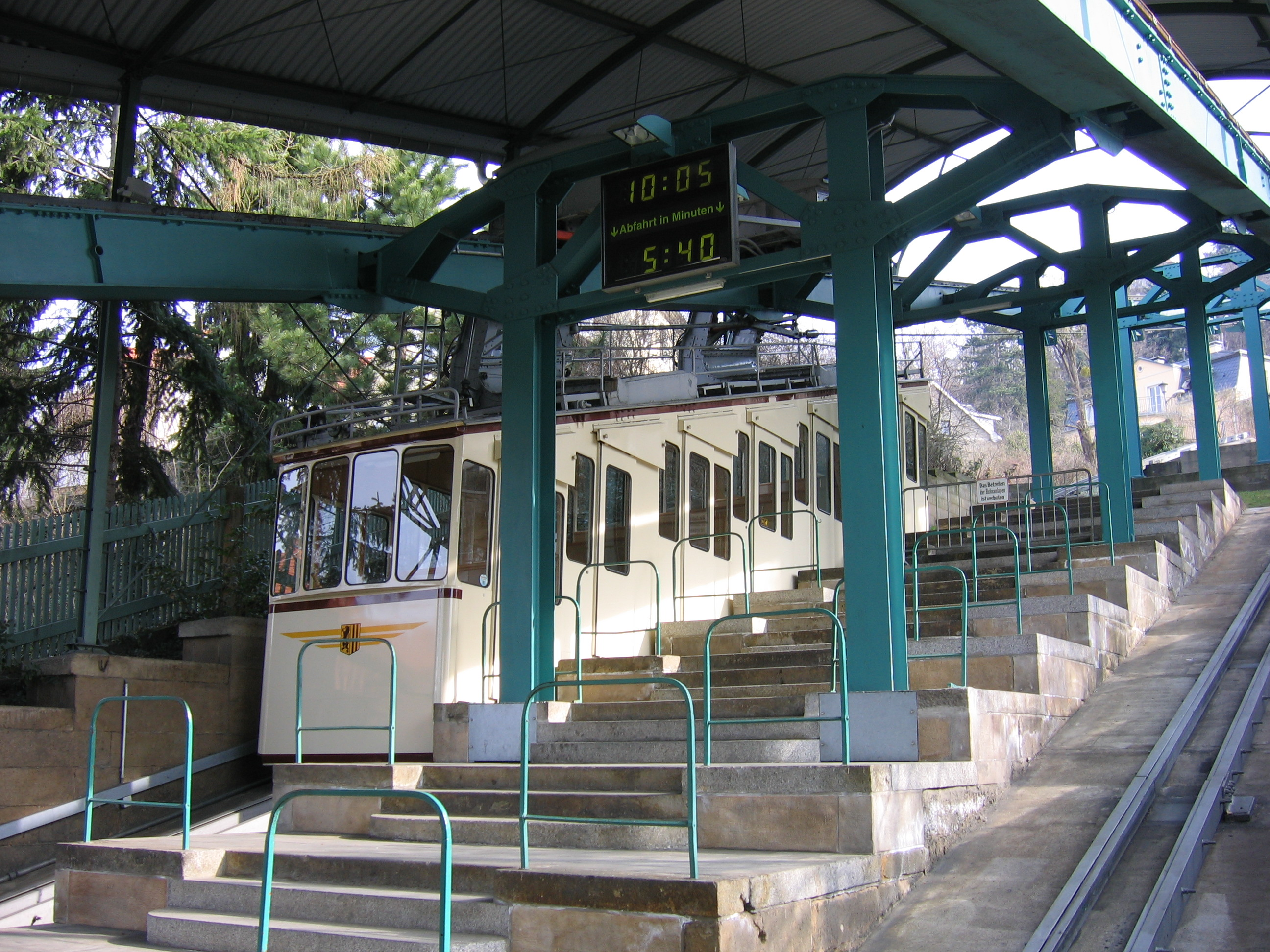 Schwebebahn Dresden, bei der Einfahrt in die Talstation